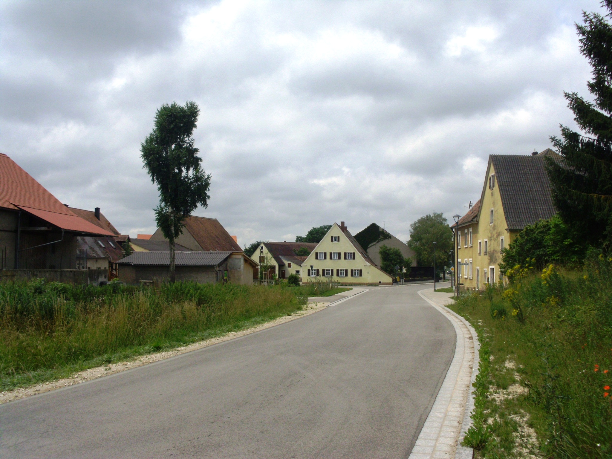 Heglau, Ortsteil von Merkendorf (Mittelfranken)